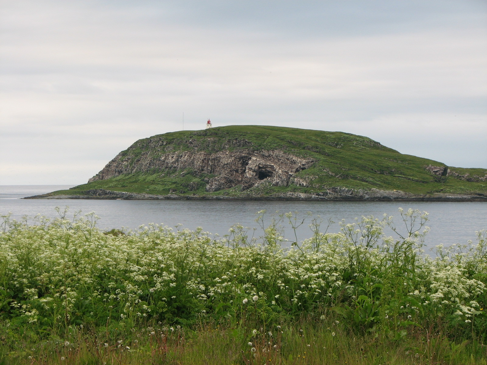 Hornøya.